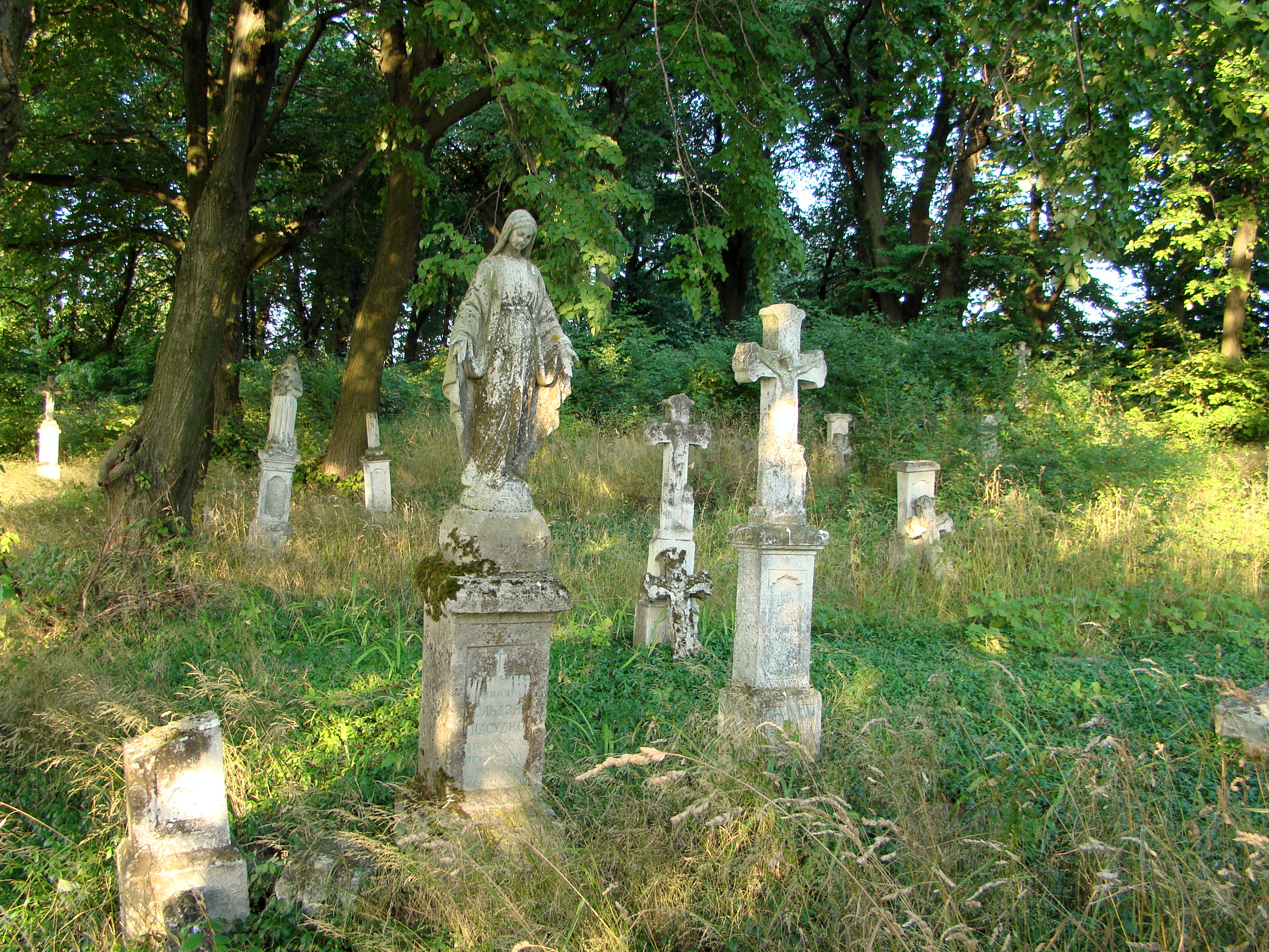 Kříže ve vesnici Gozdów Polsko